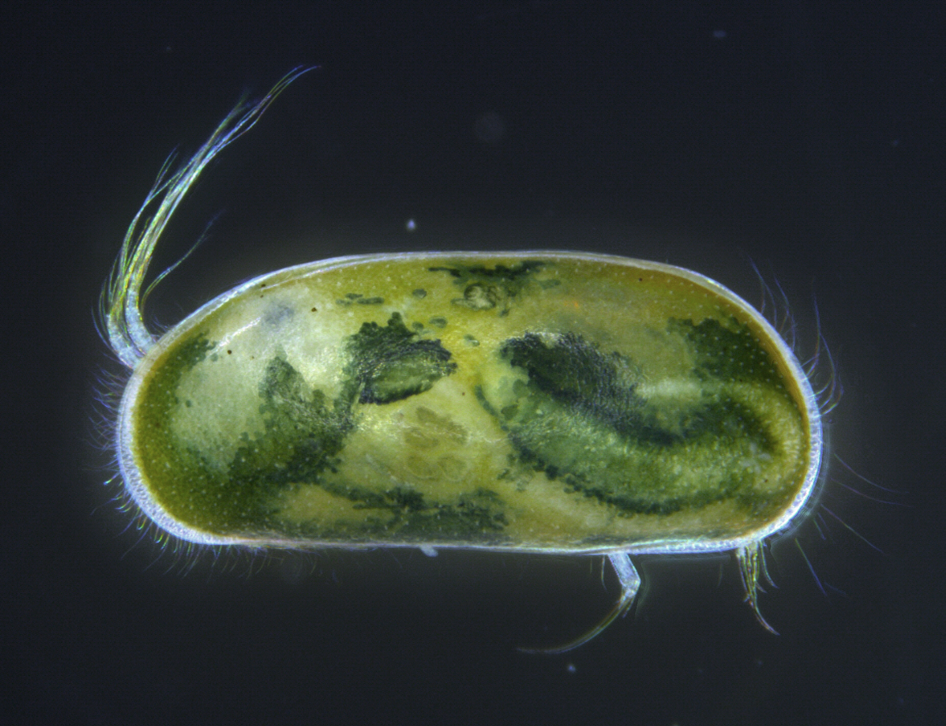 Krepsdyret stormuslingkreps (Herpetocypris reptans)